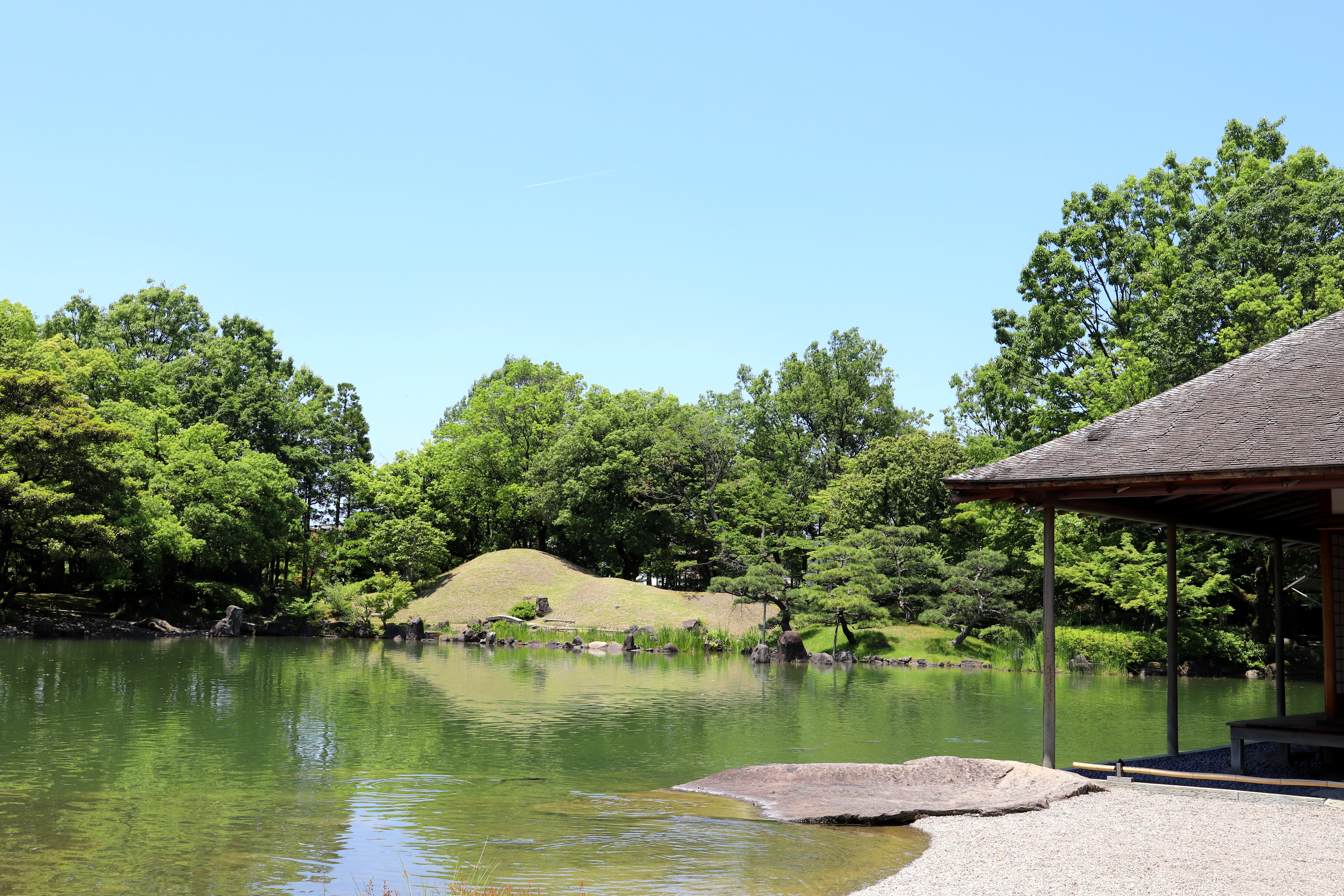 養浩館庭園 船着き場の岩, 福井県福井市